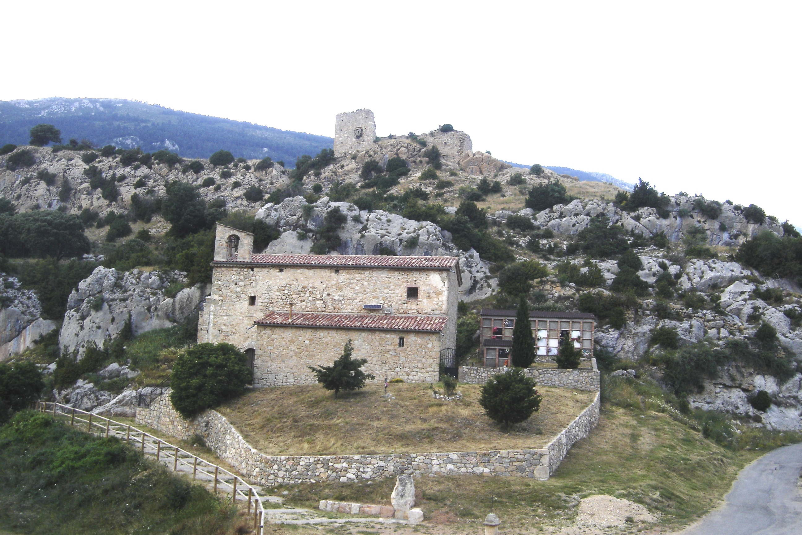 Odèn (Solsonès). Les ruïnes del castell i l'església de Santa Cecília